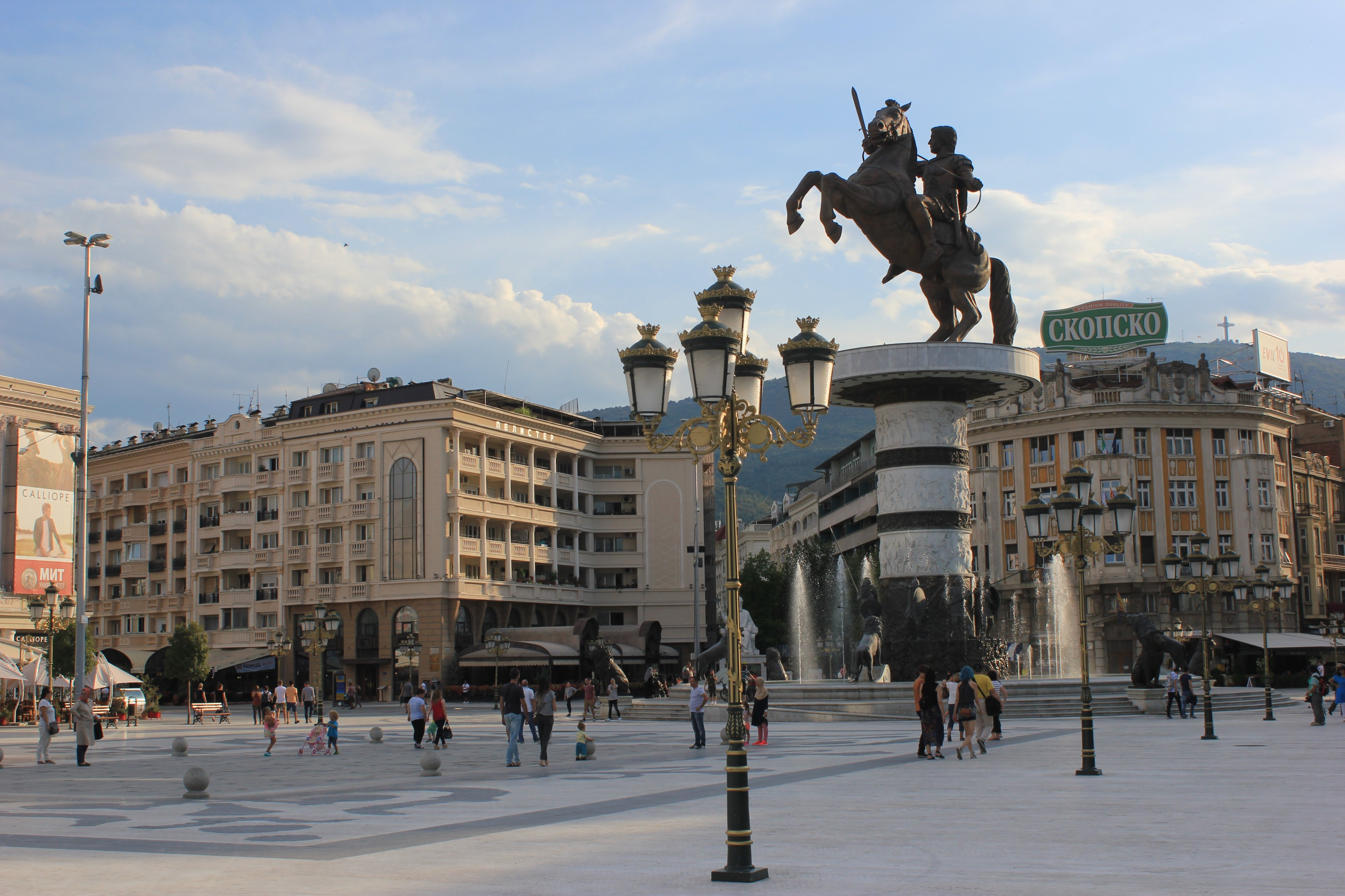 Platz Mazedoniens im Zentrum von Skopje.